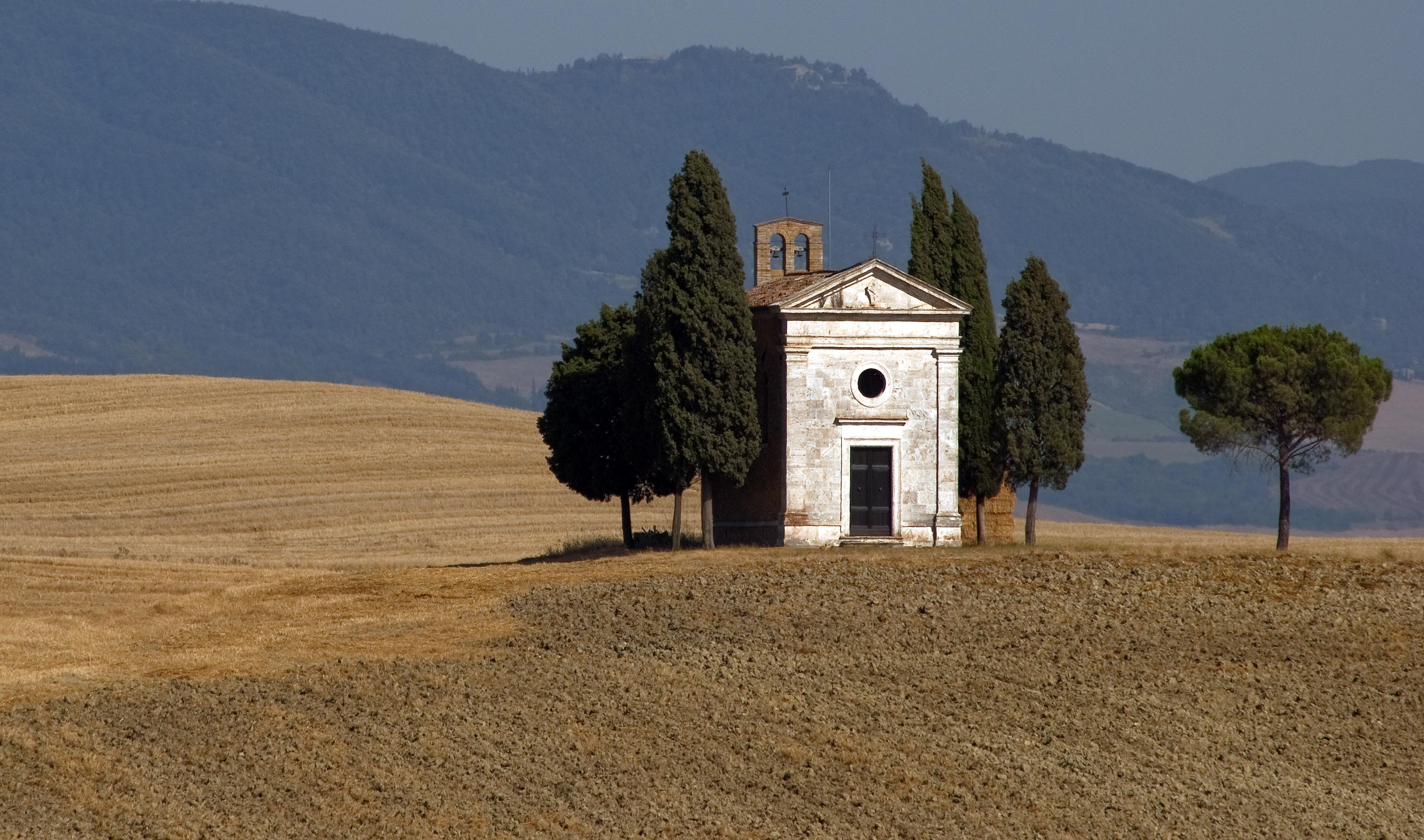 Cappella della Madonna di Vitaleta (San Quirico d'Orcia) - Siena